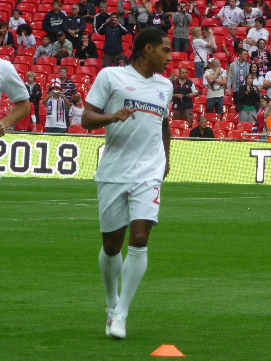 Glen Johnson